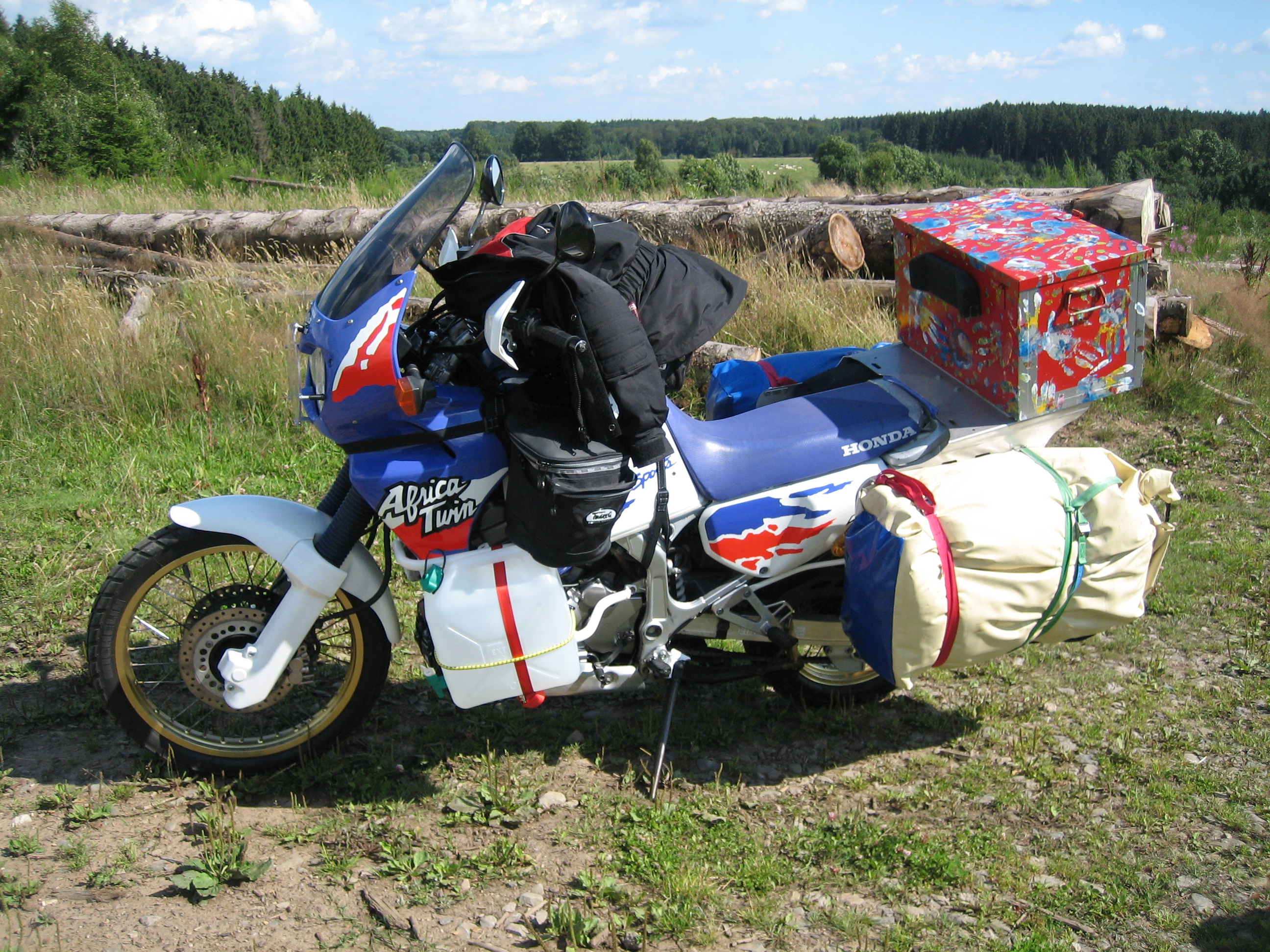 Bij mijn stukje tekst Honda Africa Twin wil ik graag deze foto plaasten van mijn eigen motor waarmee mijn vrouw en ik in 2005 van Nederland naar India zijn gereden. voor meer info kijk op